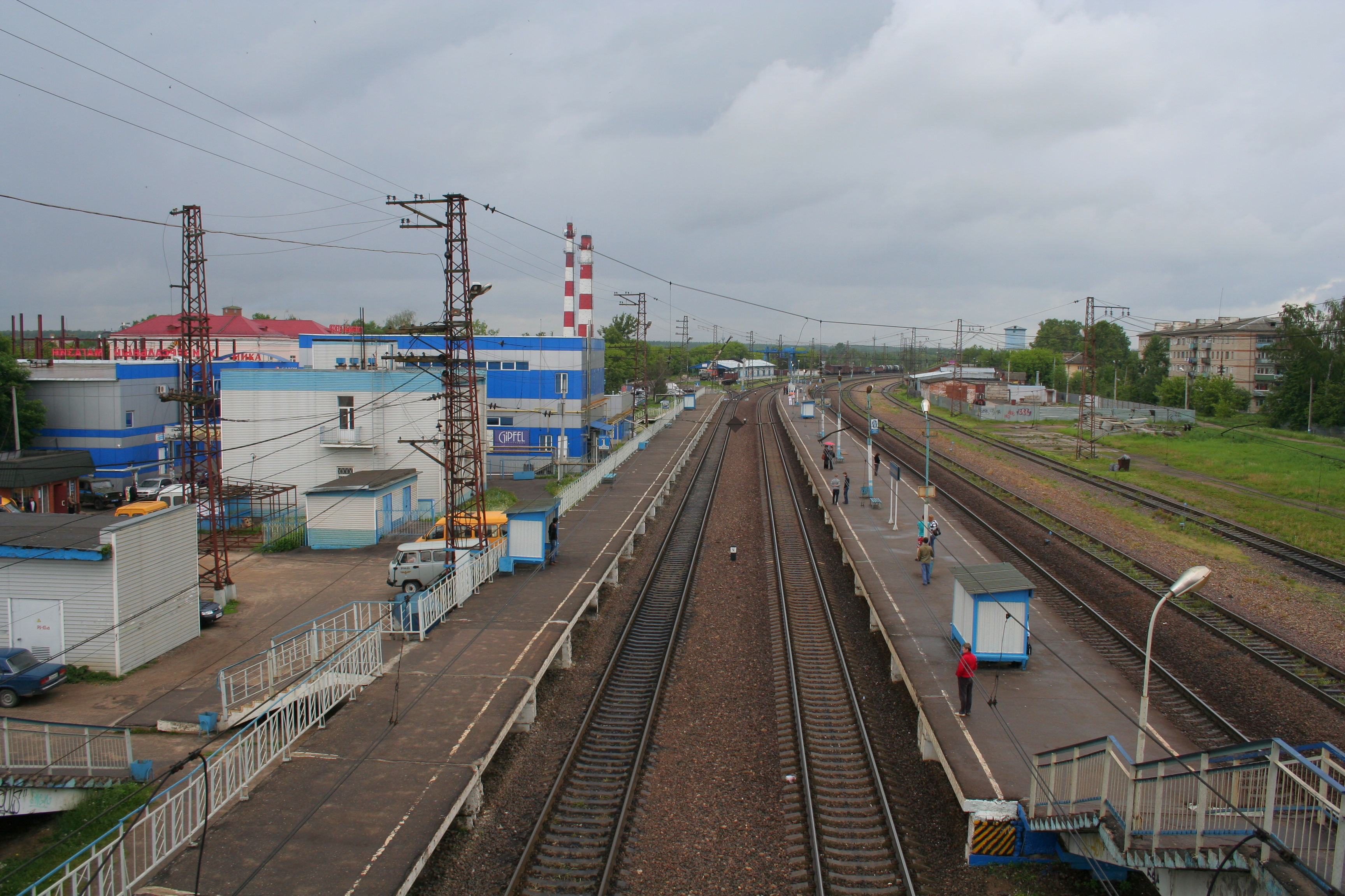 Bahnhof Balabanowo, Oblast Kaluga, Russland